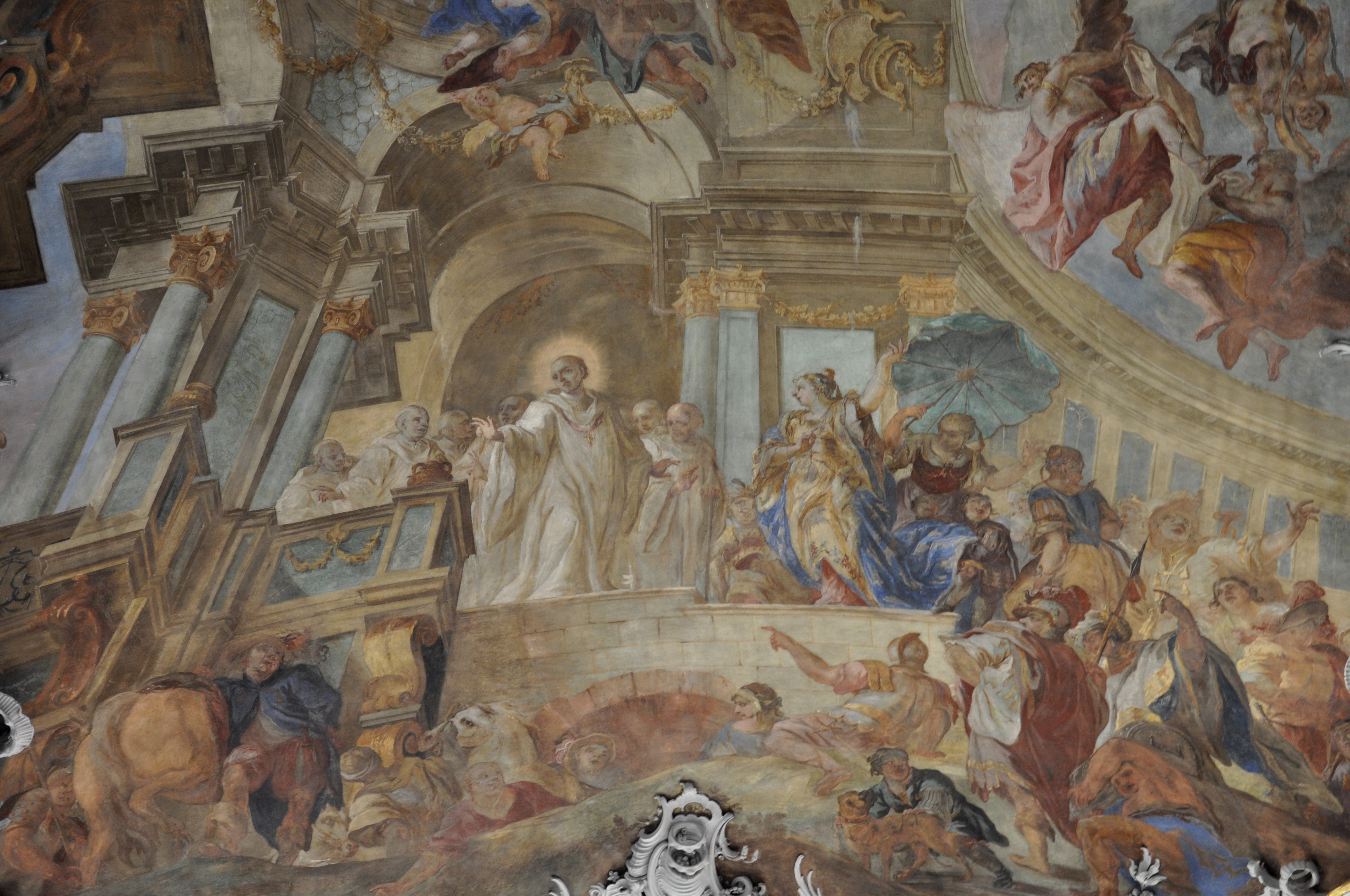 Klosterkirche Wald (Landkreis Sigmaringen), Deckengemälde im Langhaus von Andreas Meinrad von Ow: Begegnung des hl. Bernhard mit Schwester Humbelina an der Klosterpforte"; Detail